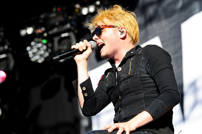 Gerard Way en un concierto de My Chemical Romance en el Big Day Out 2012.